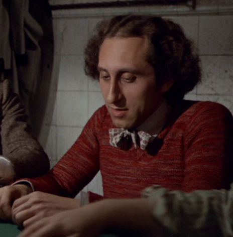 scena dal film Il piatto piange